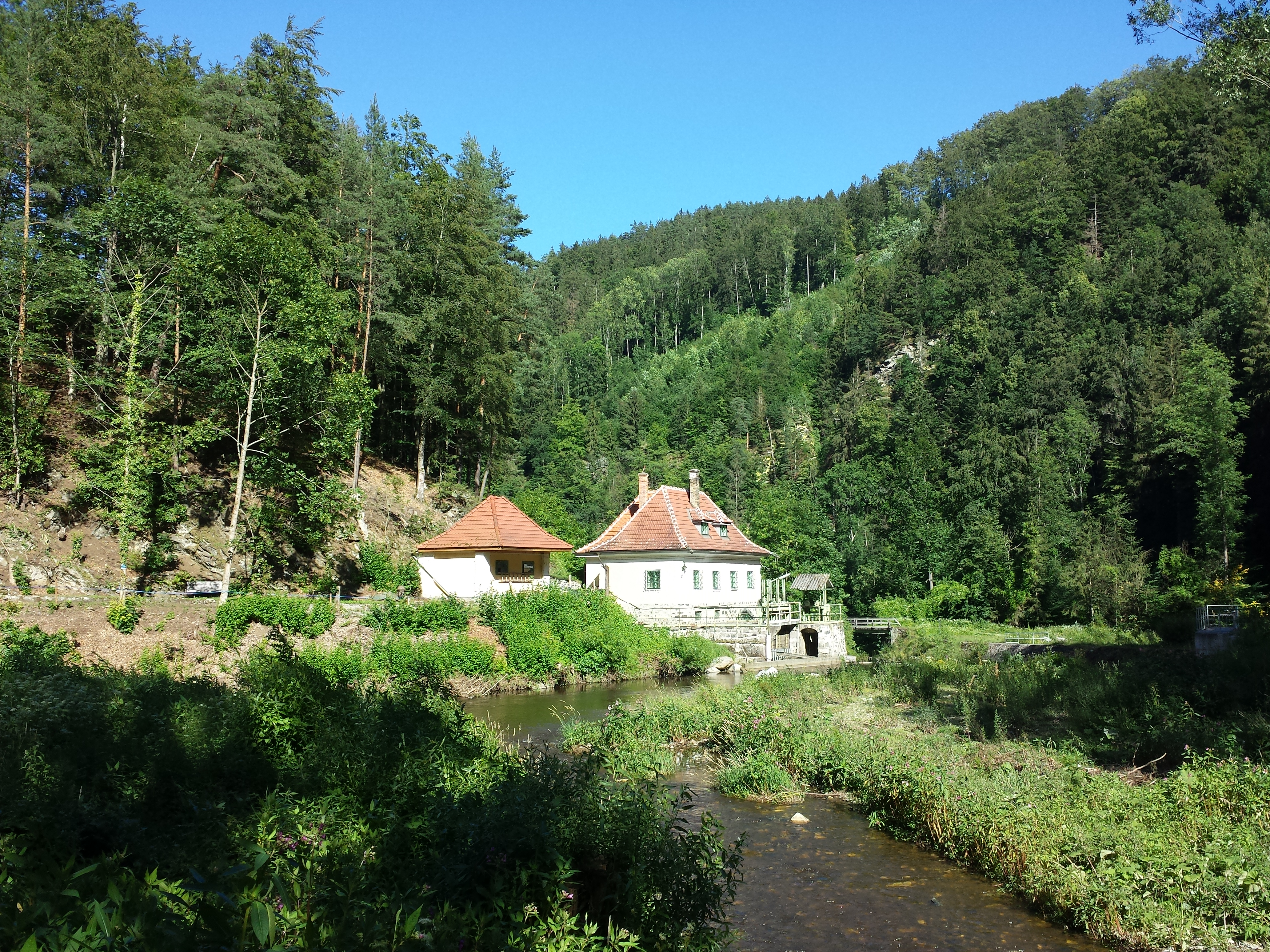 Kraftwerksgebäude im Kremser Zwickl, Bezirk Krems-Land, Niederösterreich